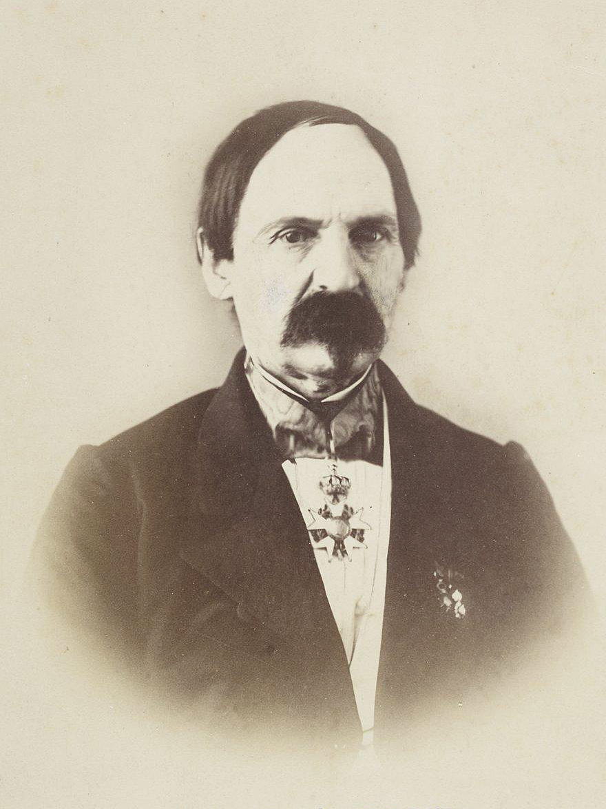 Adrien Berbrugger